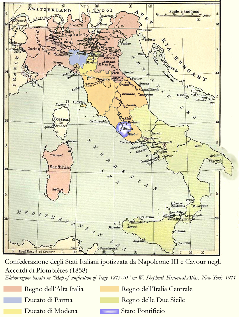 Carta della Confederazione di Stati italiani ipotizzata da Camillo Benso conte di Cavour e Napoleone III di Francia negli Accordi di Plombières